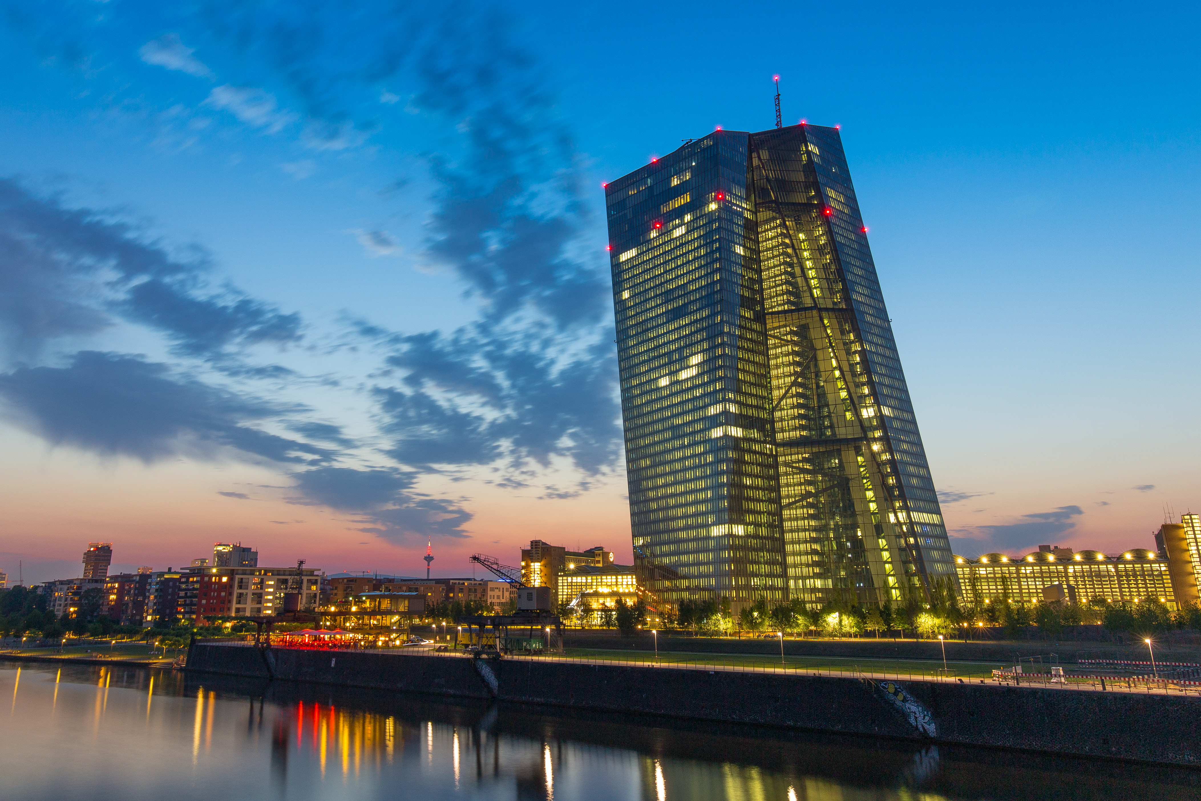 02.Juli.2015 Frankfurt am Main